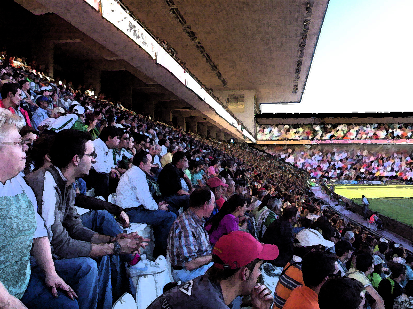 Fotomontaje de la futura grada de fondo sur (al fondo), al lado de la de preferencia (ya construida)